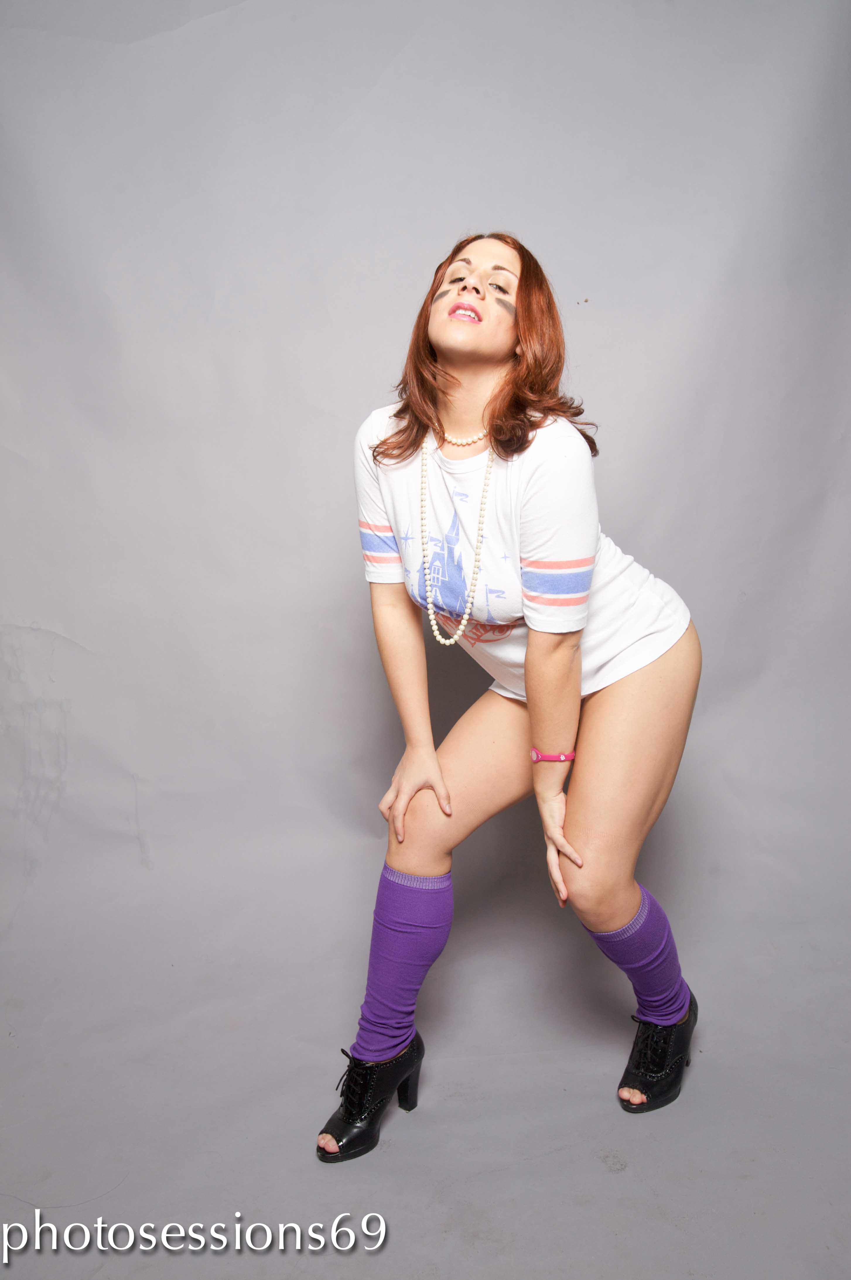 Iris Delianne Fortuño, nació el 27 de octubre de 1986 en San Juan, Puerto Rico.